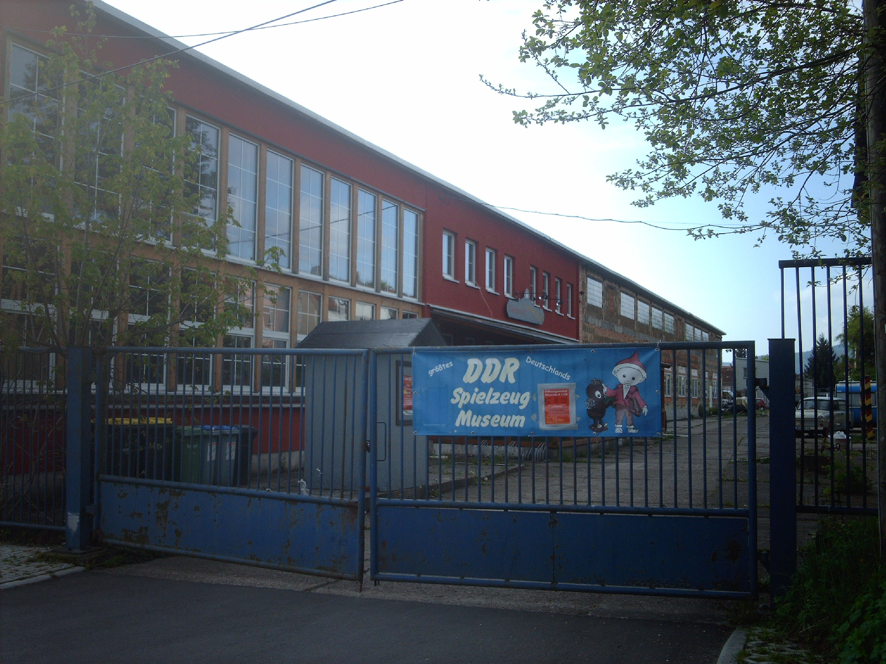 DDR-Spielzeugmuseum in Ilmenau